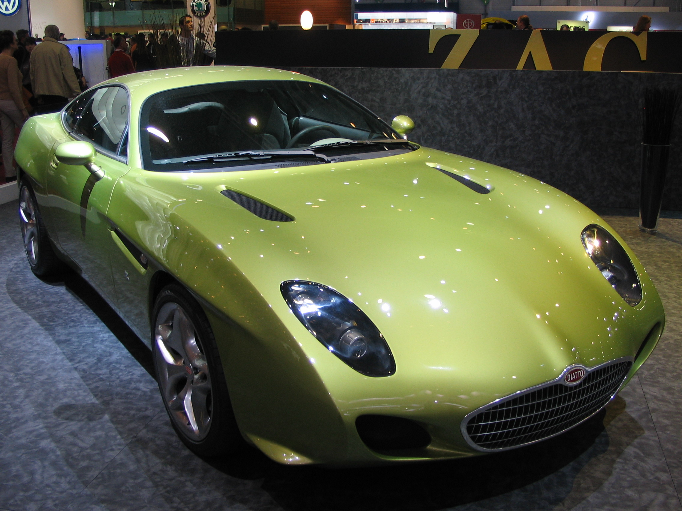 Diatto OttoVù Zagato et sa calandre rétro, salon de Genève 2007 -- afin de célébrer le centenaire de cet ancien constructeur de luxe disparu, et leur collaboration passée, le carrossier milanais présente ce coupé sportif propulsé par un V8 4,6l.